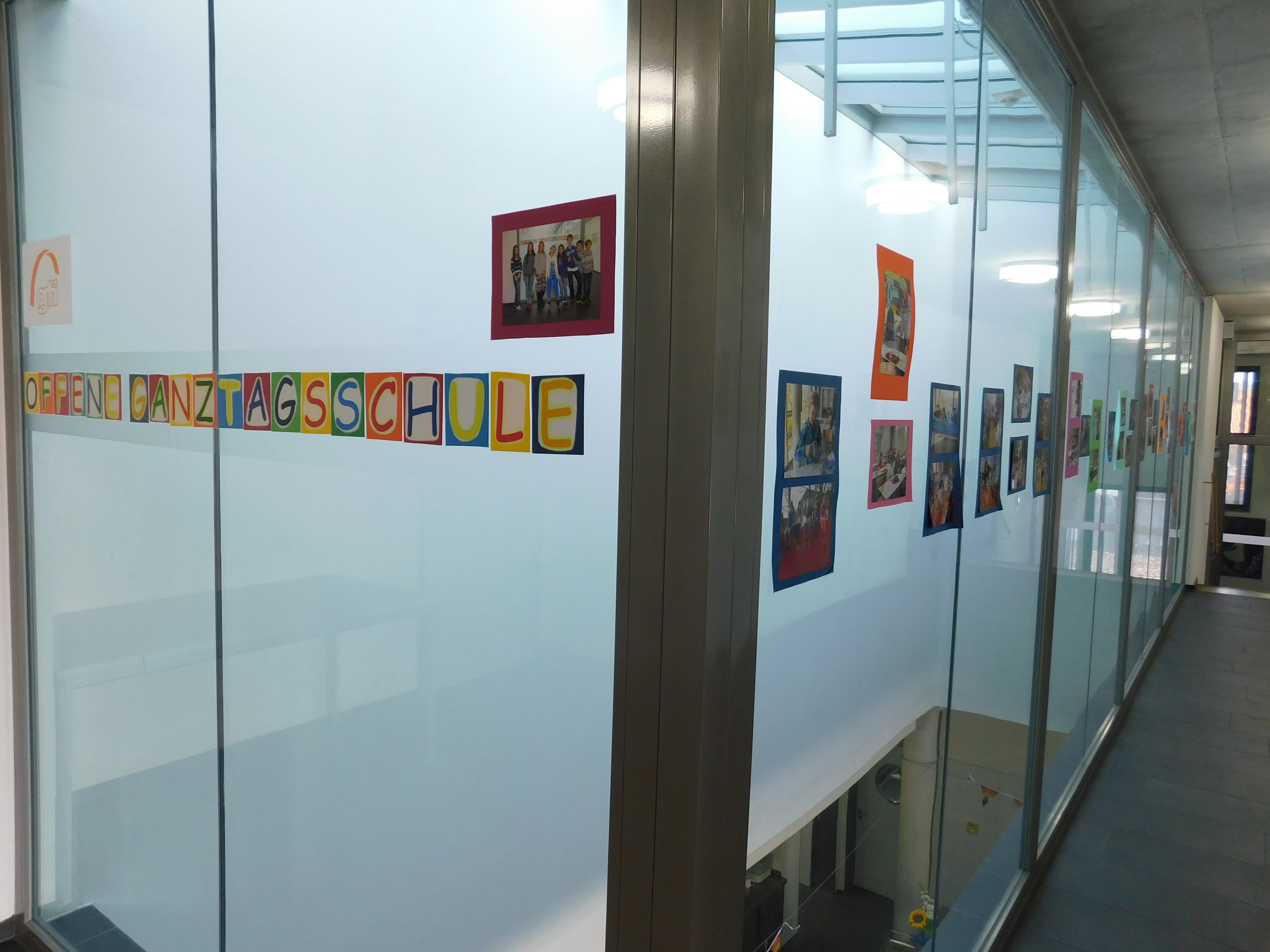 Christoph-Probst-Gymnasium Gilching Bayern Deutschland Räume Ganztagsbetreuung